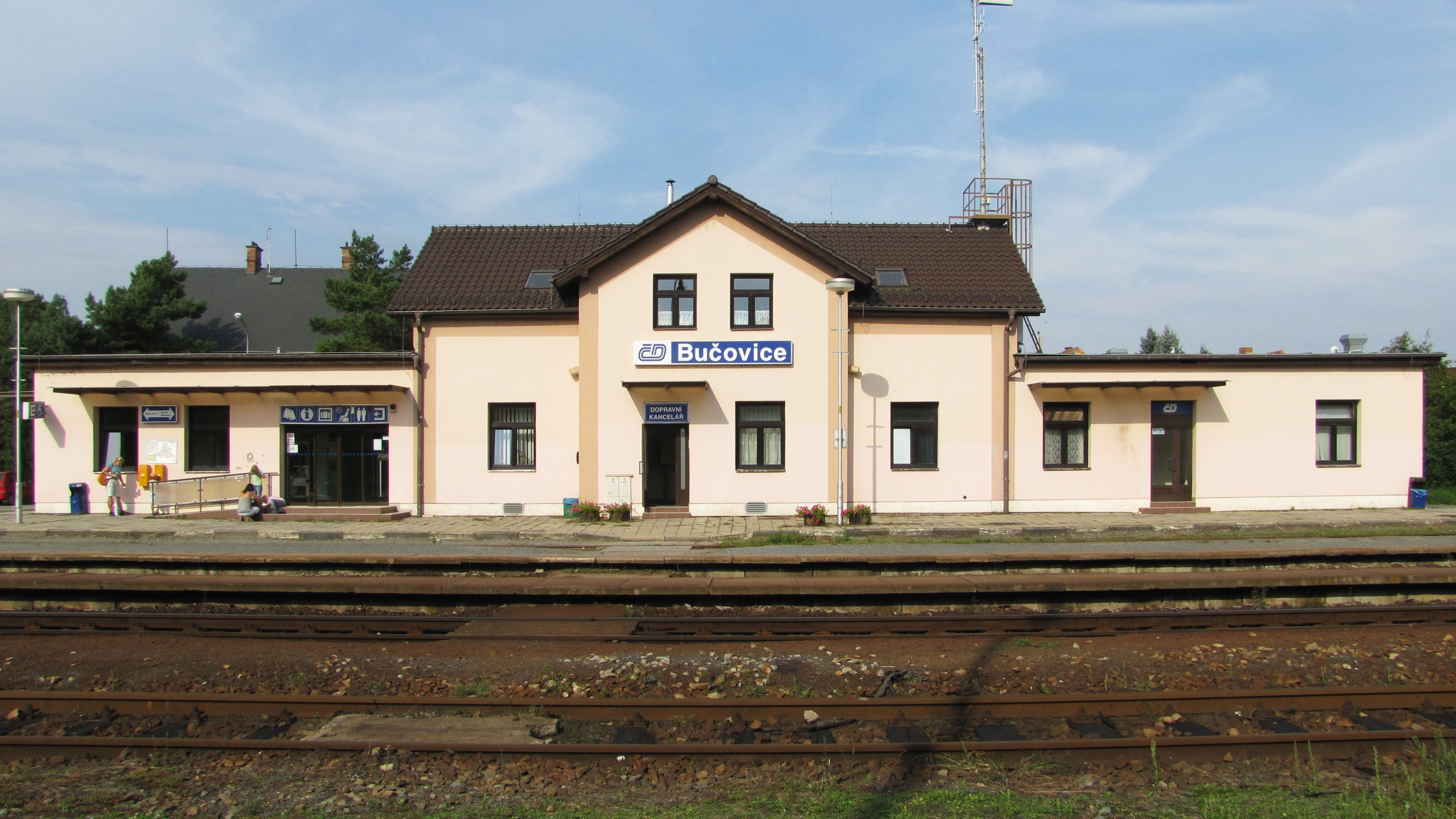 Nádraží v Bučovicích na Vlárské dráze